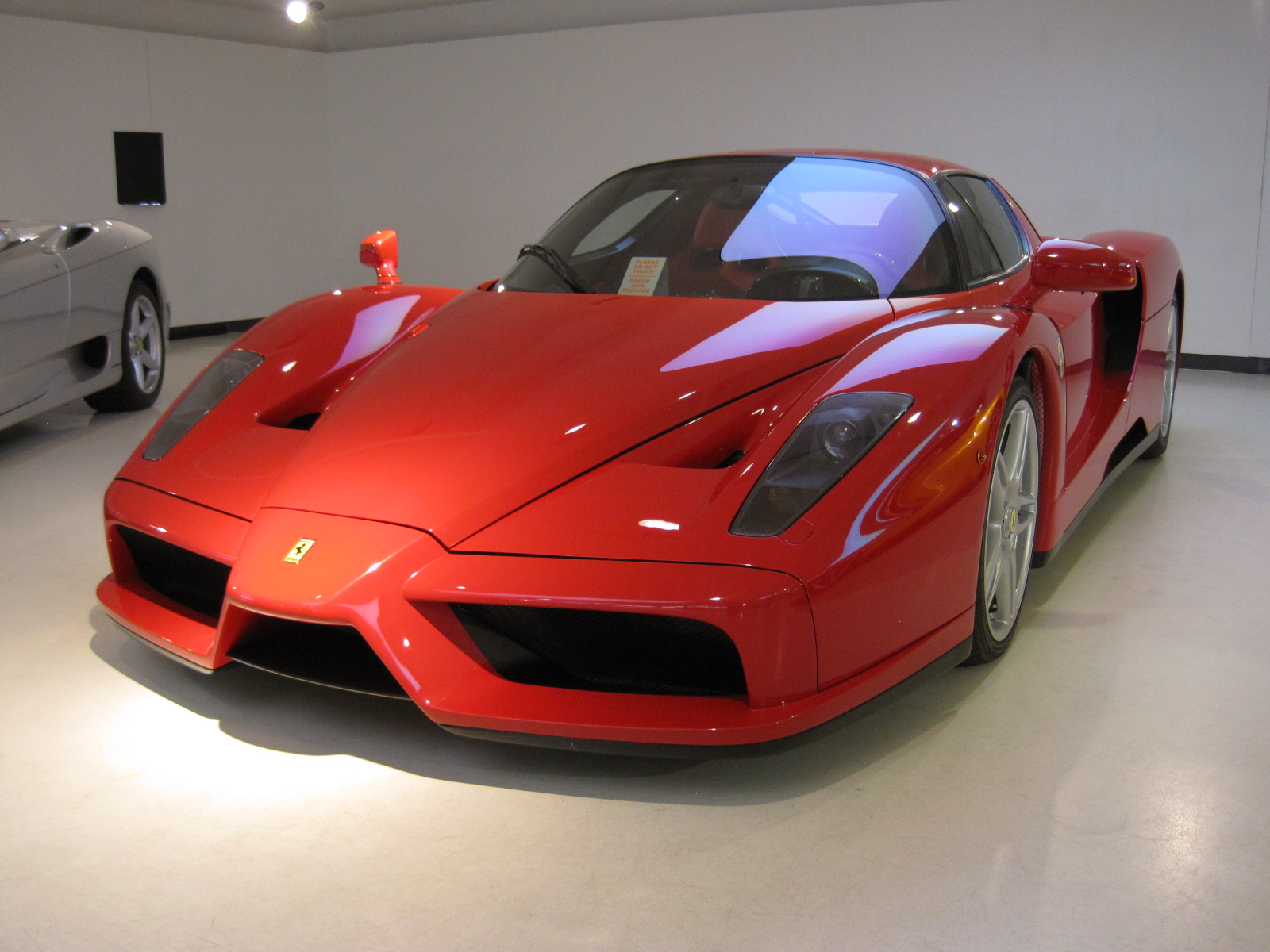 Automobiles in the Galleria Ferrari - Ferrari Enzo 2002 - V12 - 5,9 litres